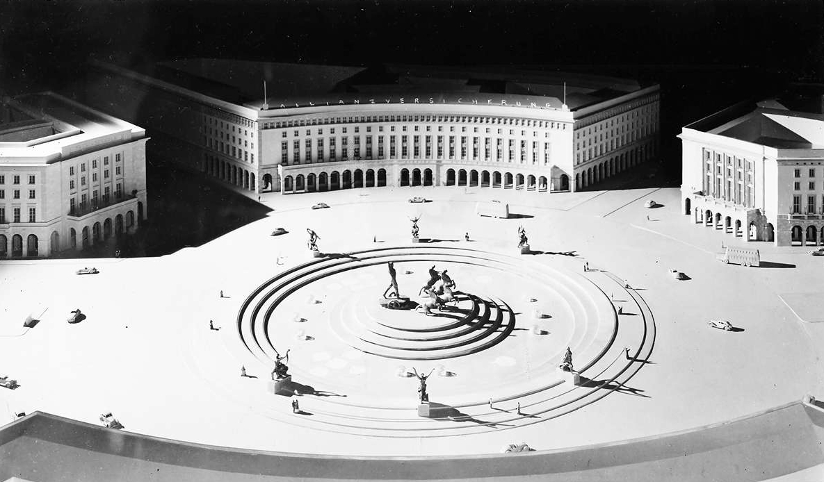 Berlin im Umbau 1939: Modell vom Runden Platz; mit Allianz-Neubau; von oben. Blick vom Haus des Fremdenverkehrs über den Runden Platz auf das nicht fertiggestellte Haus der Allianz-Versicherung, einem Teil der Nord-Süd-Achse der sogenannten Welthauptstadt Germania.